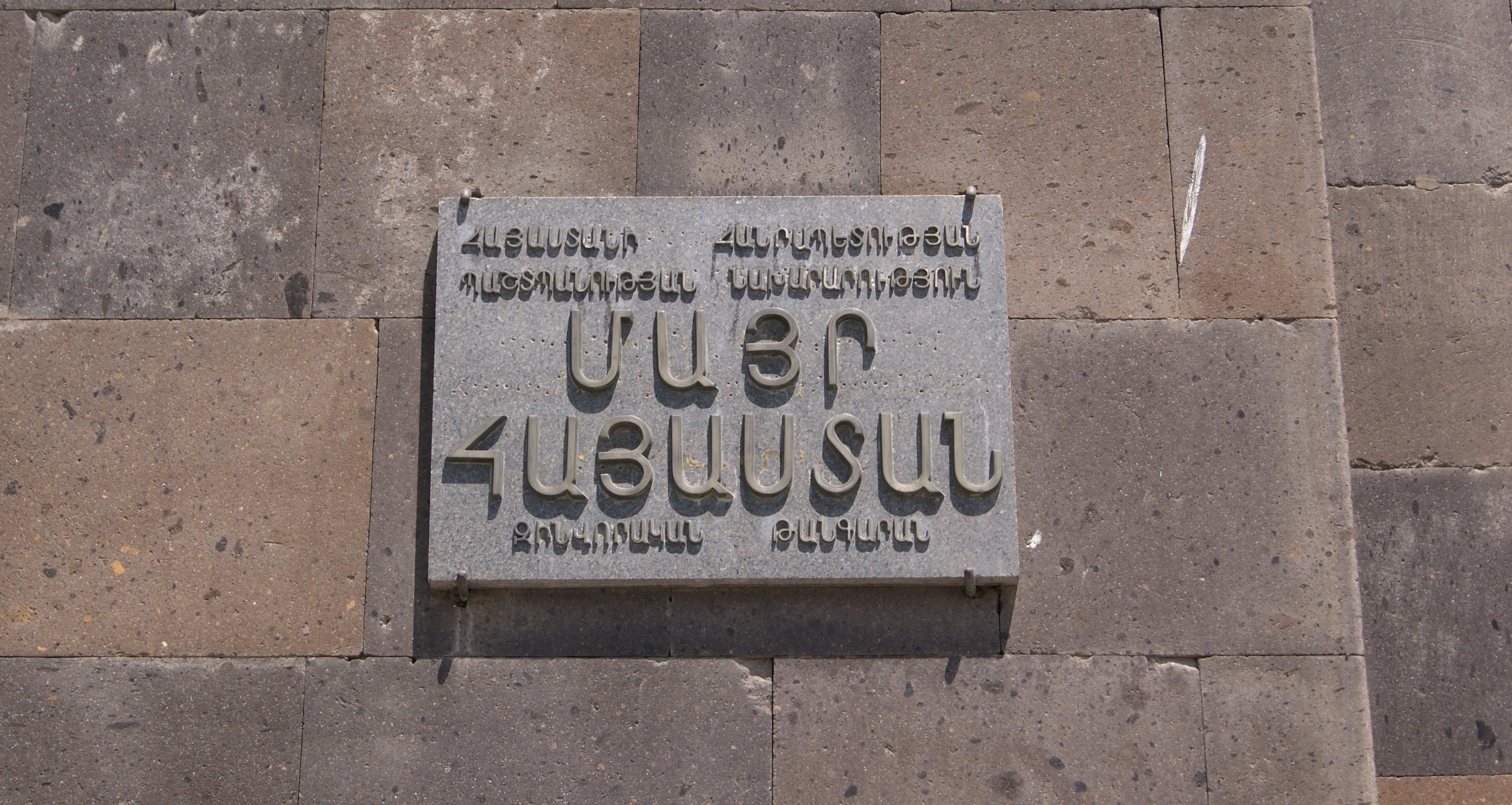 Mother Armenia Monument, Yerevan 12/10.3